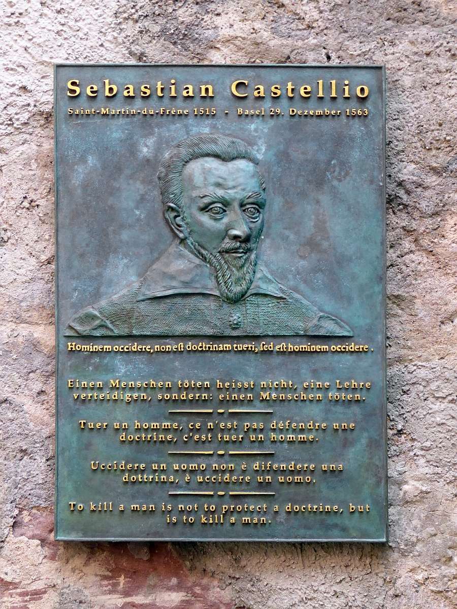 Am 4.November 2016 wurde bei der St. Alban-Kirche in Basel eine Castellio-Gedenktafel angebracht.